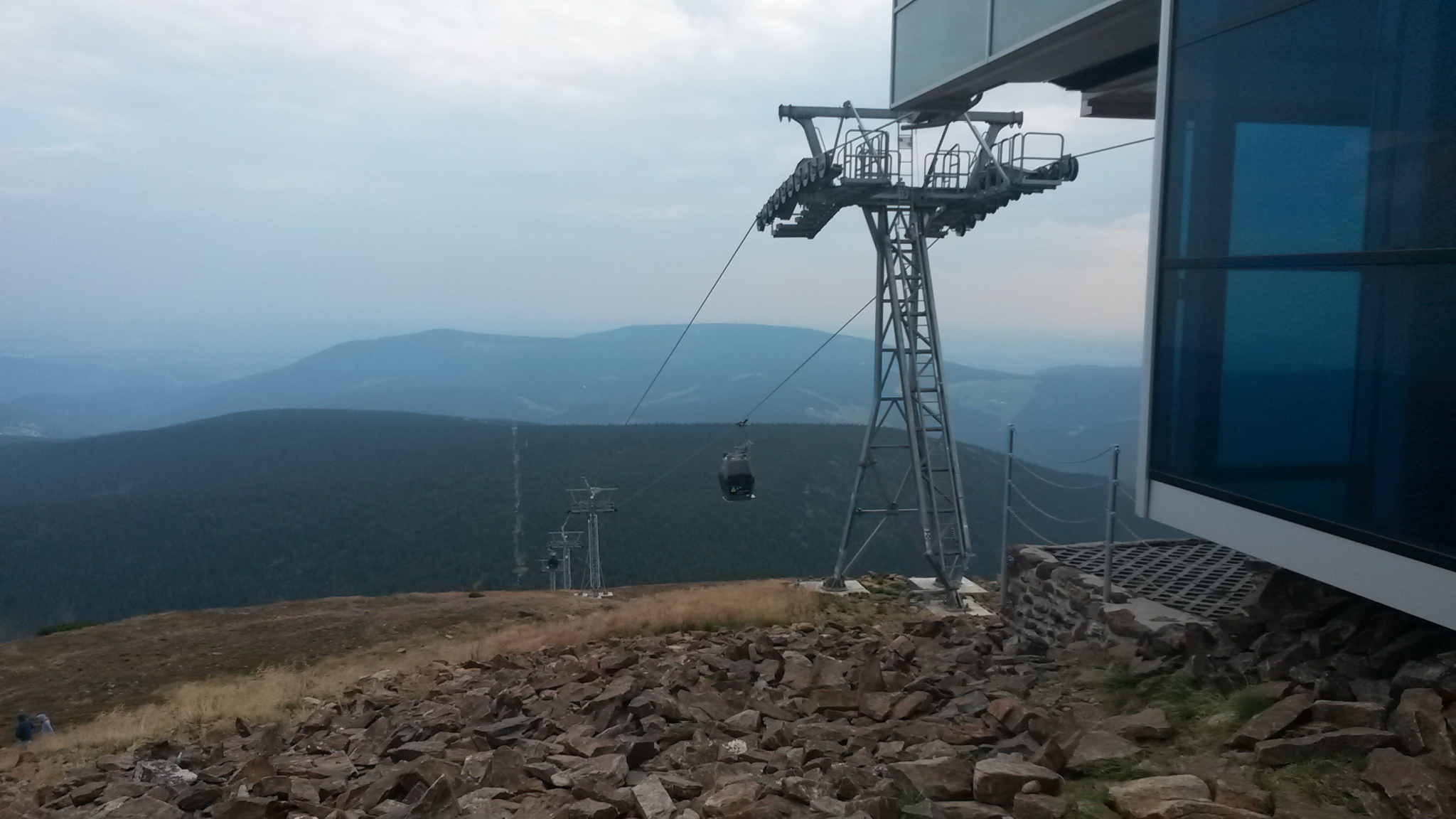 Lanová Dráha na Sněžku